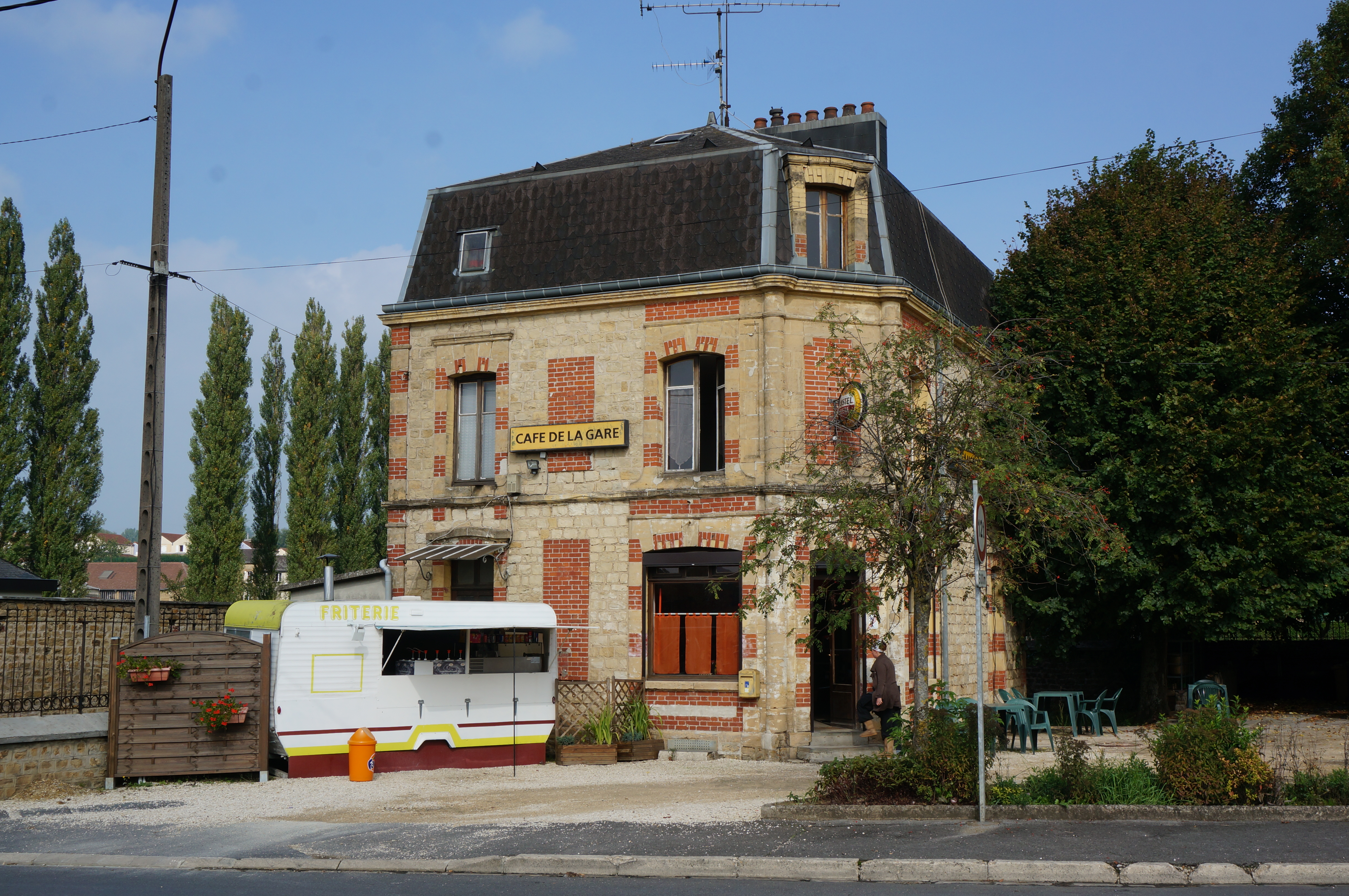 Vue du village .